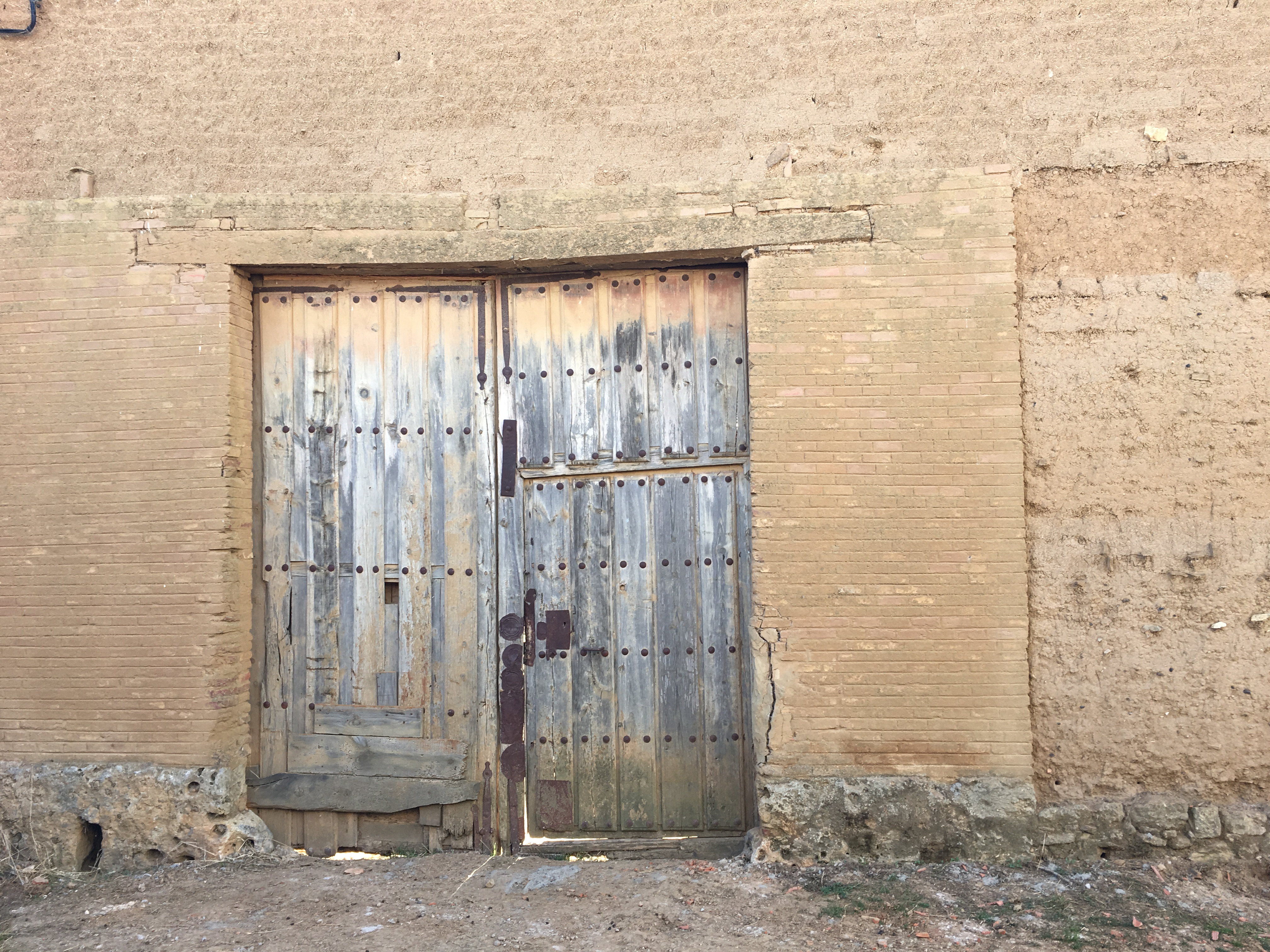 Villaesper Milenario